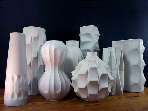 Vases de la série "Archais", Manufacture Hutschenreuther, allemagne, XXe siècle